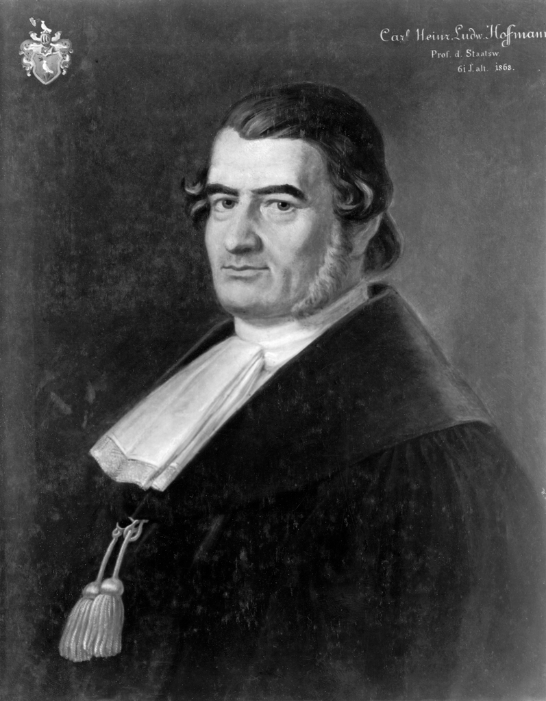 Carl Heinrich Ludwig Hoffmann, Prof. für württembergisches Verwaltungsrecht in Tübingen, 1807-1881